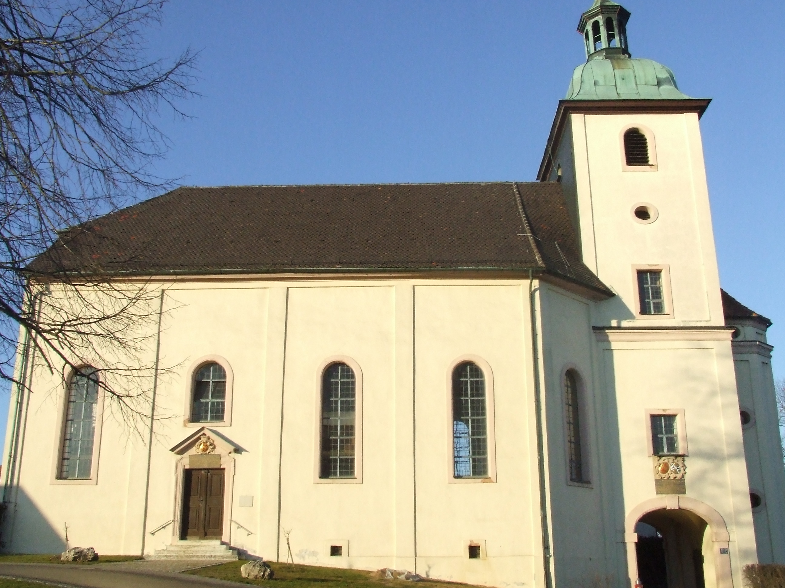 Schlosskirche Sulzbürg von Süden, Überrest des ehemalig gräflich Wolfsteinischen Schlosses Obersulzbürg, Gemeinde Mühlhausen in der Oberpfalz